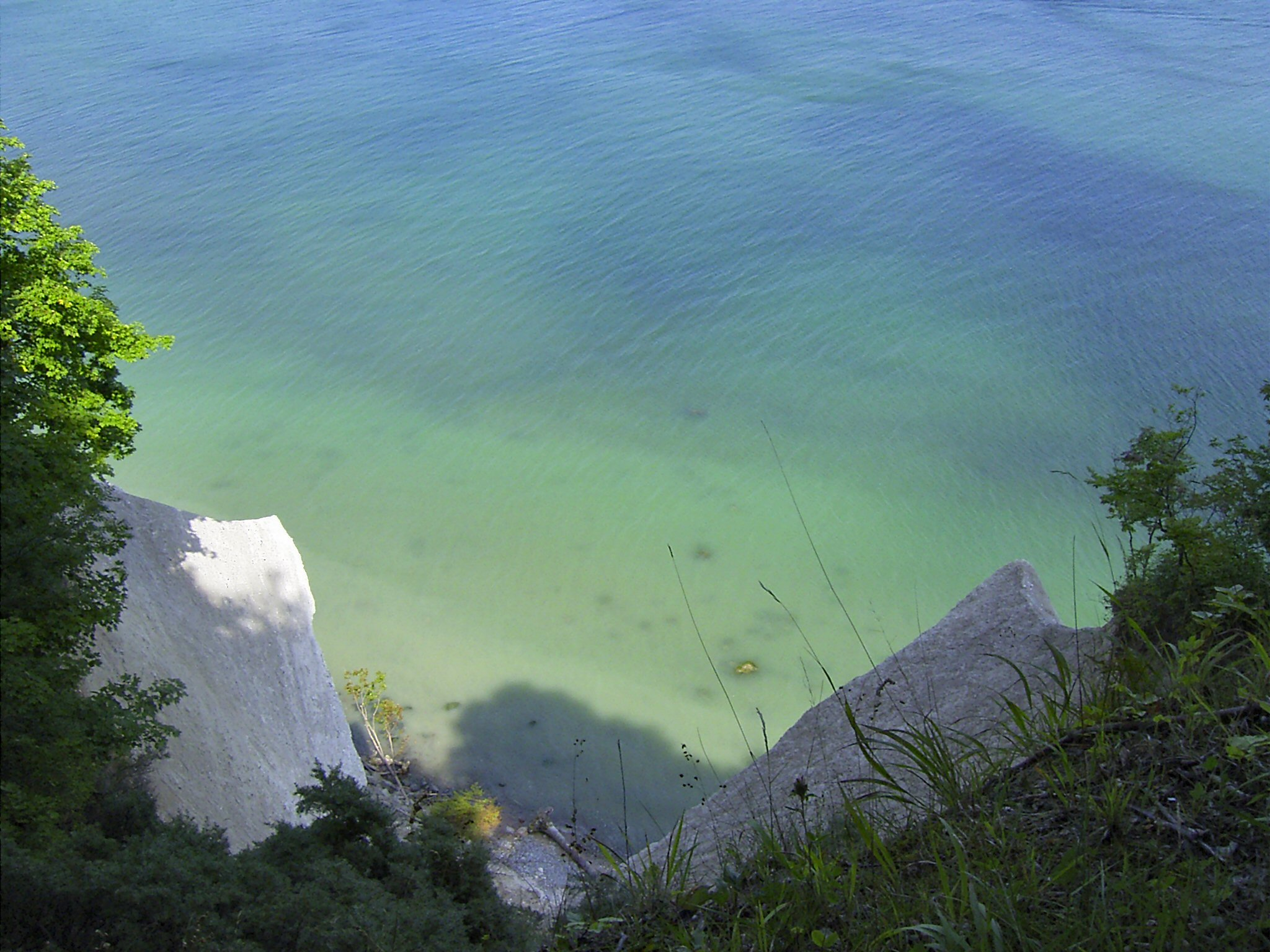 Die Wissower Klinken – eine Kreideformation im Nationalpark Jasmund auf der Insel Rügen nach dem großen Küstenabbruch, der am 24. Februar 2005 50.000 m³ Kreide ins Meer riss